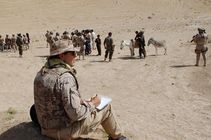 Ferrer Dalmau en Afganistán